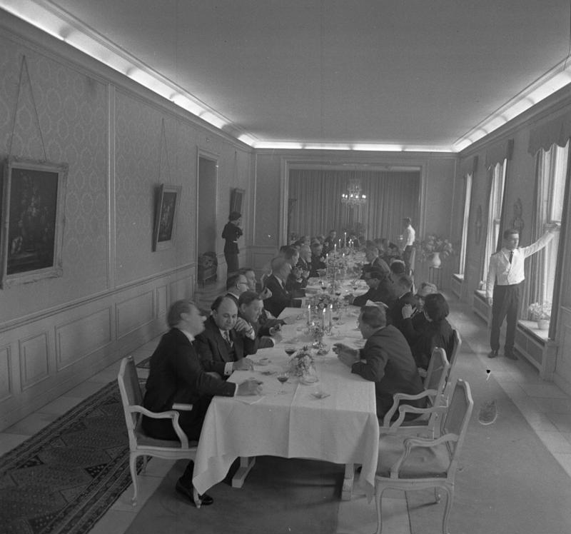 Staatsbesuch Zypern Essen des Ministerpräs. (Vertreter Dr Hundhammer) im Hotel Continental München